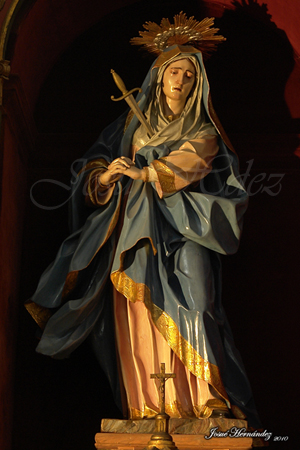 Dolorosa de José Luján Pérez, que se encuentra en la Catedral de Santa Ana (Las Palmas de Gran Canaria)